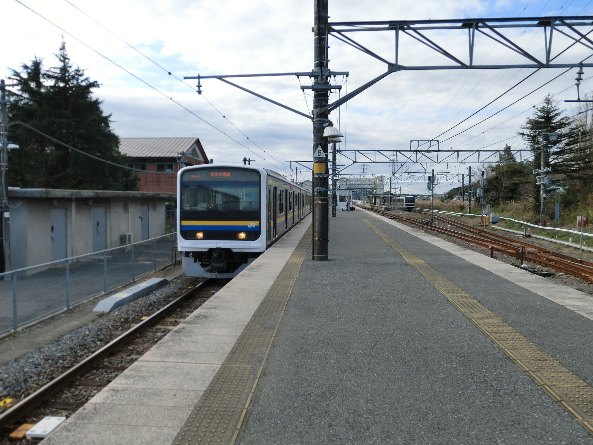 東金線成東